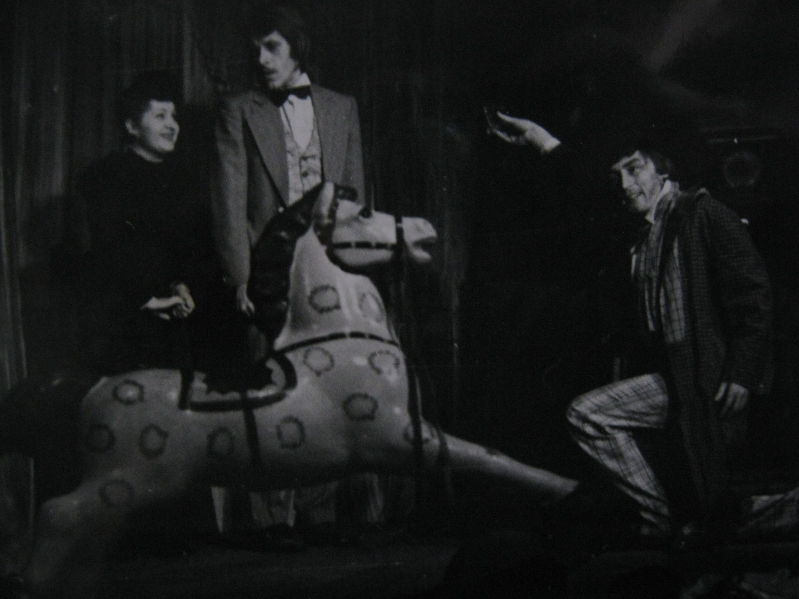 Сцена из спектакля «Житейские мелочи» по мотивам рассказов Антона Павловича Чехова (рассказ Отец) в Челябинском государственном театре юных зрителей, режиссёр-постановщик Геннадий Егоров